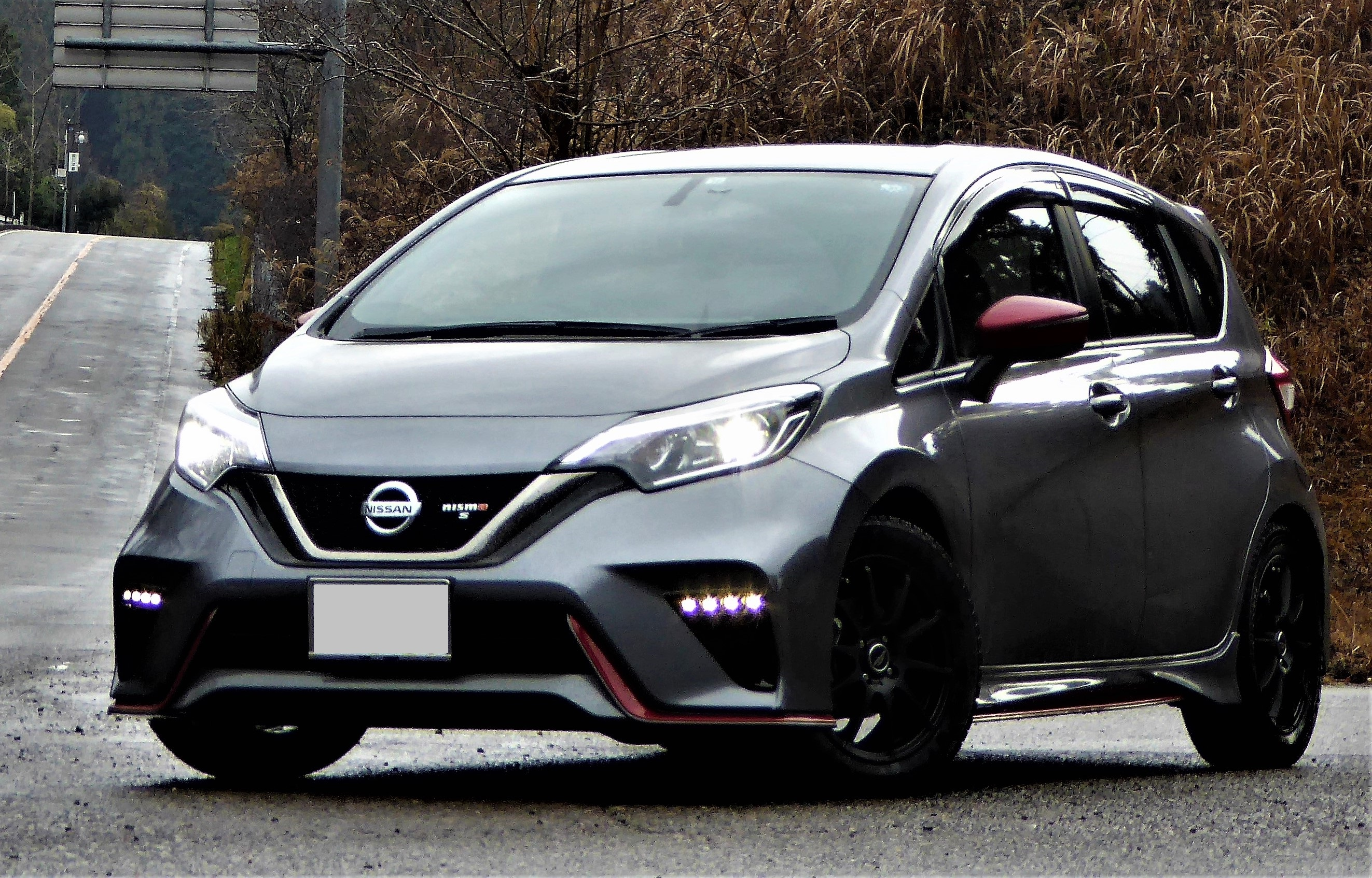 日産 ノートニスモS 2016年改良版のフロントフェイス